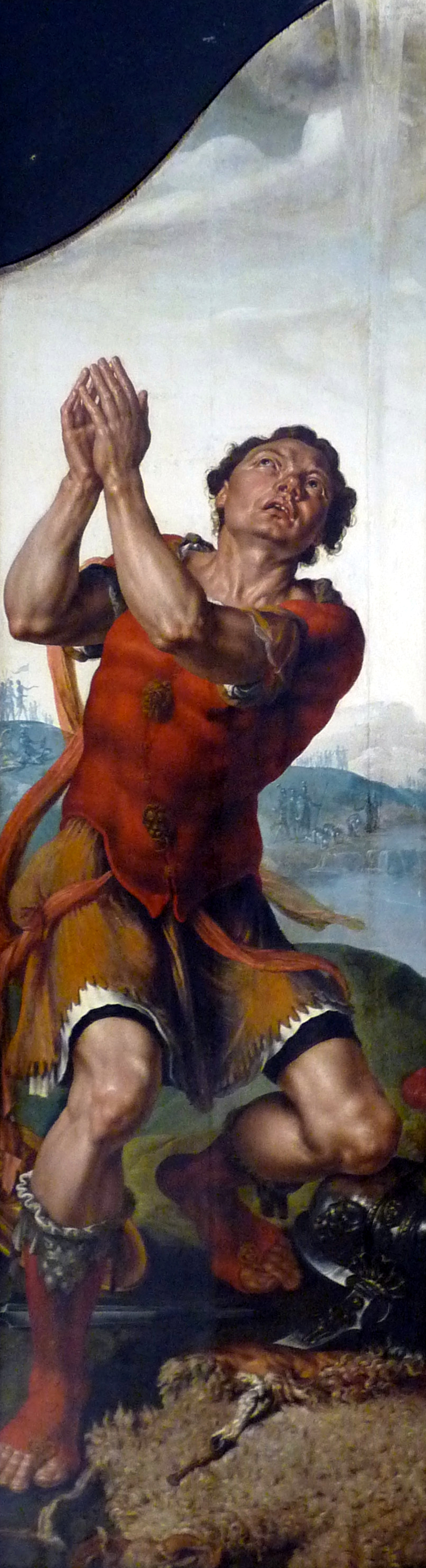 Gédéon ; Adam et Eve (vers 1550), huiles sur bois A l'origine, un tableau (perdu)avec la Vierge était placé entre les deux panneaux.